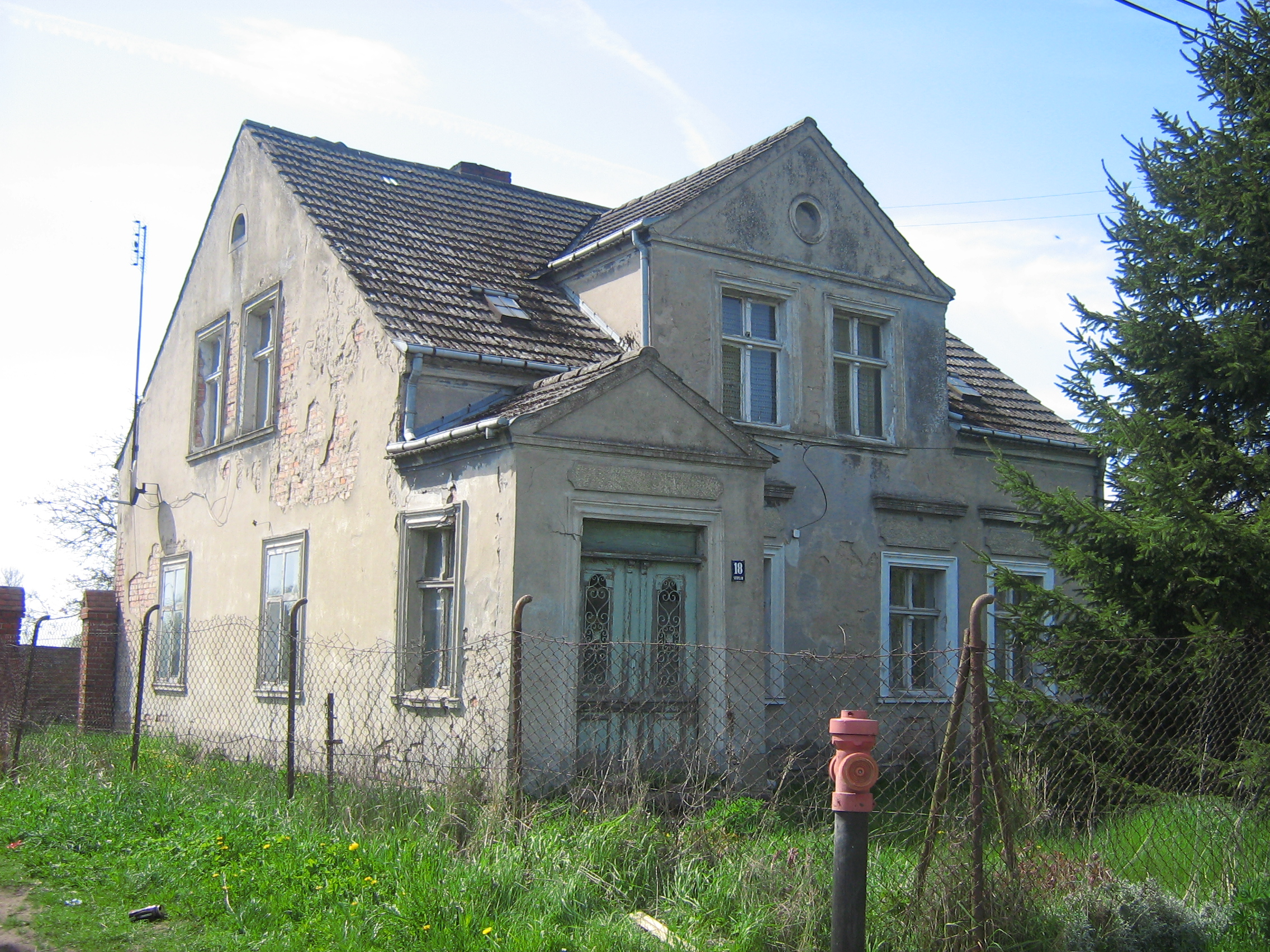 Dom z numerem "18" w Sierosławiu